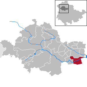 Herbsleben in Thuringia - Unstrut-Hainich-Kreis